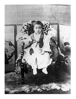 4~6세 무렵의 김규식